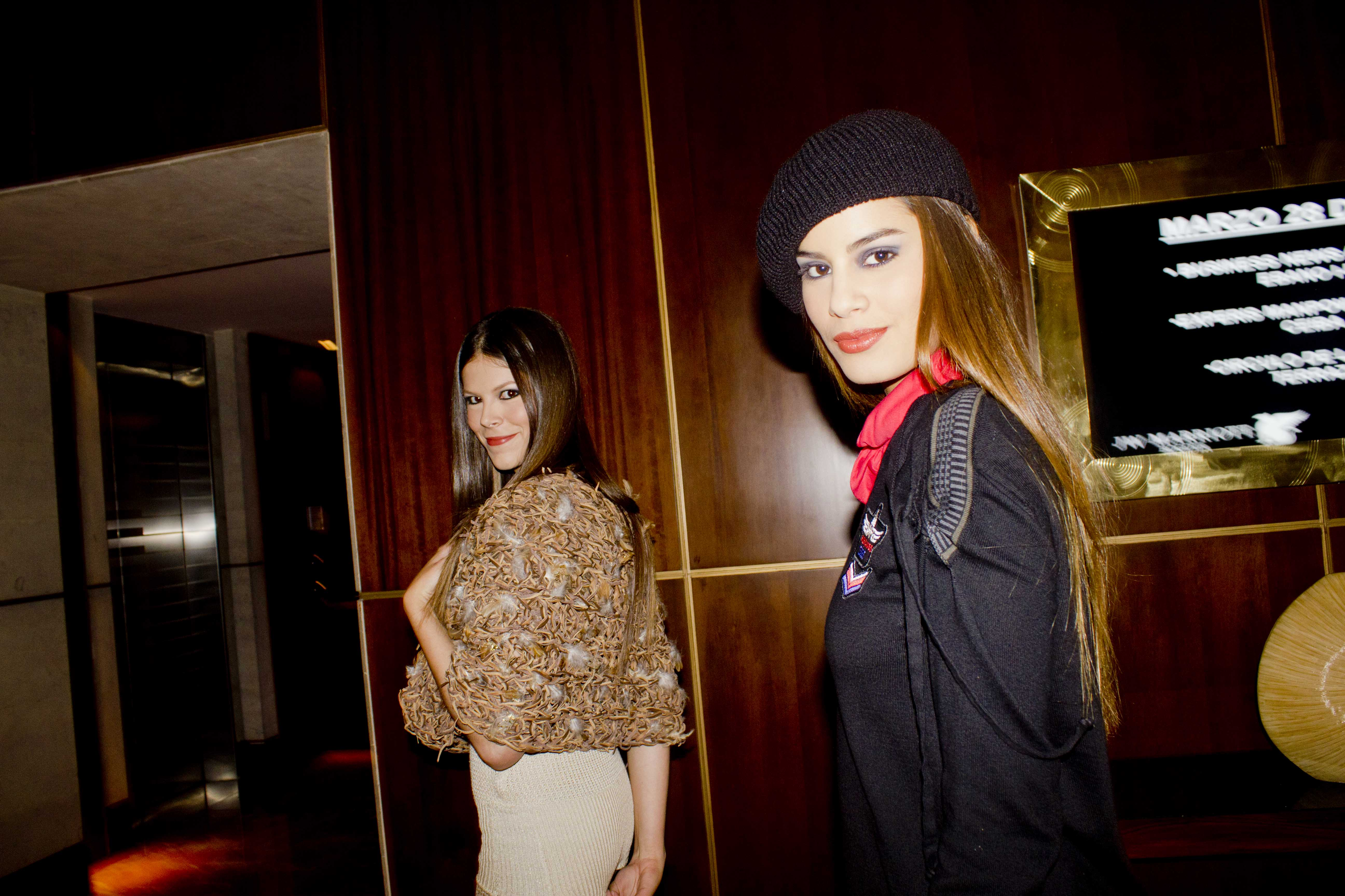 The backstage series / DOCU//GLAM Ariadna Gutierrez Lanzamiento del Circulo de la moda de Bogota 2012 Jw Marriot Bogota Photography Santi galvis